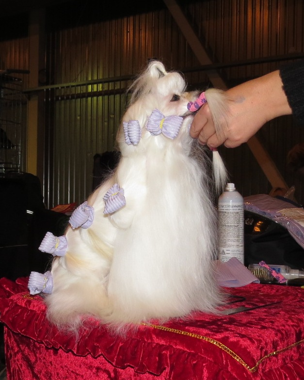 Мальтезе в папильотках. Тарту 2014